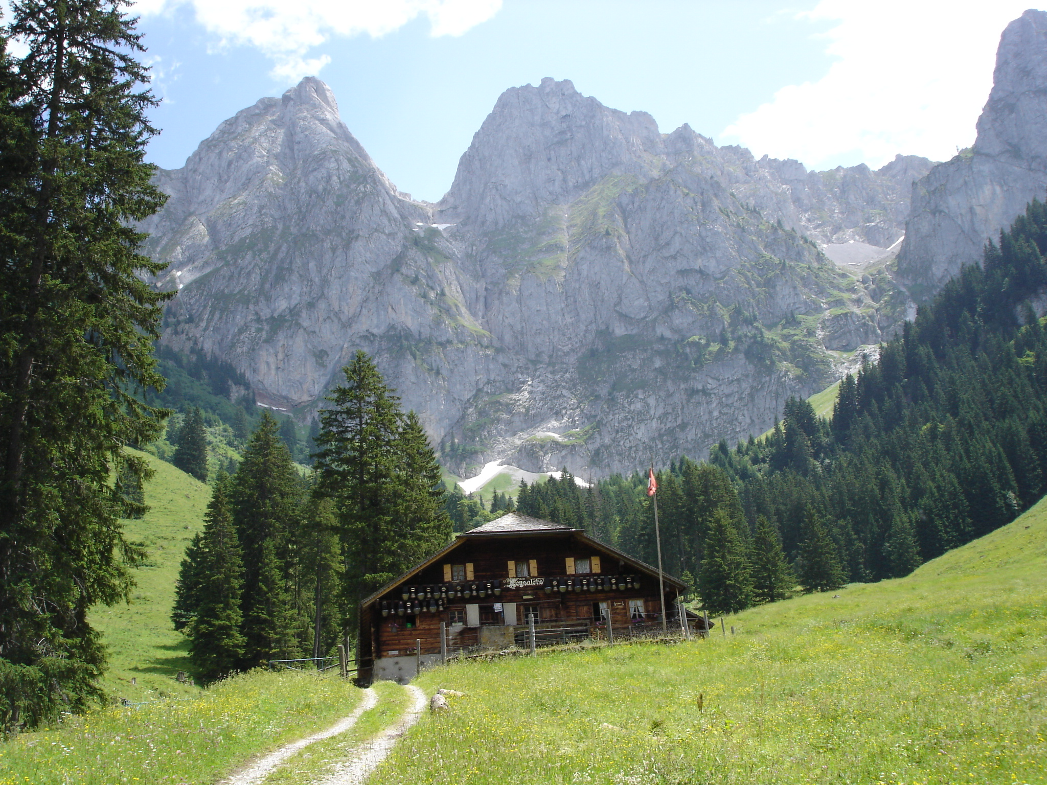 Le massif de la Gummfluh depuis l'entrée de la réserve de la Pierreuse (vallon de la Gérine, chalet des Leyssalets)